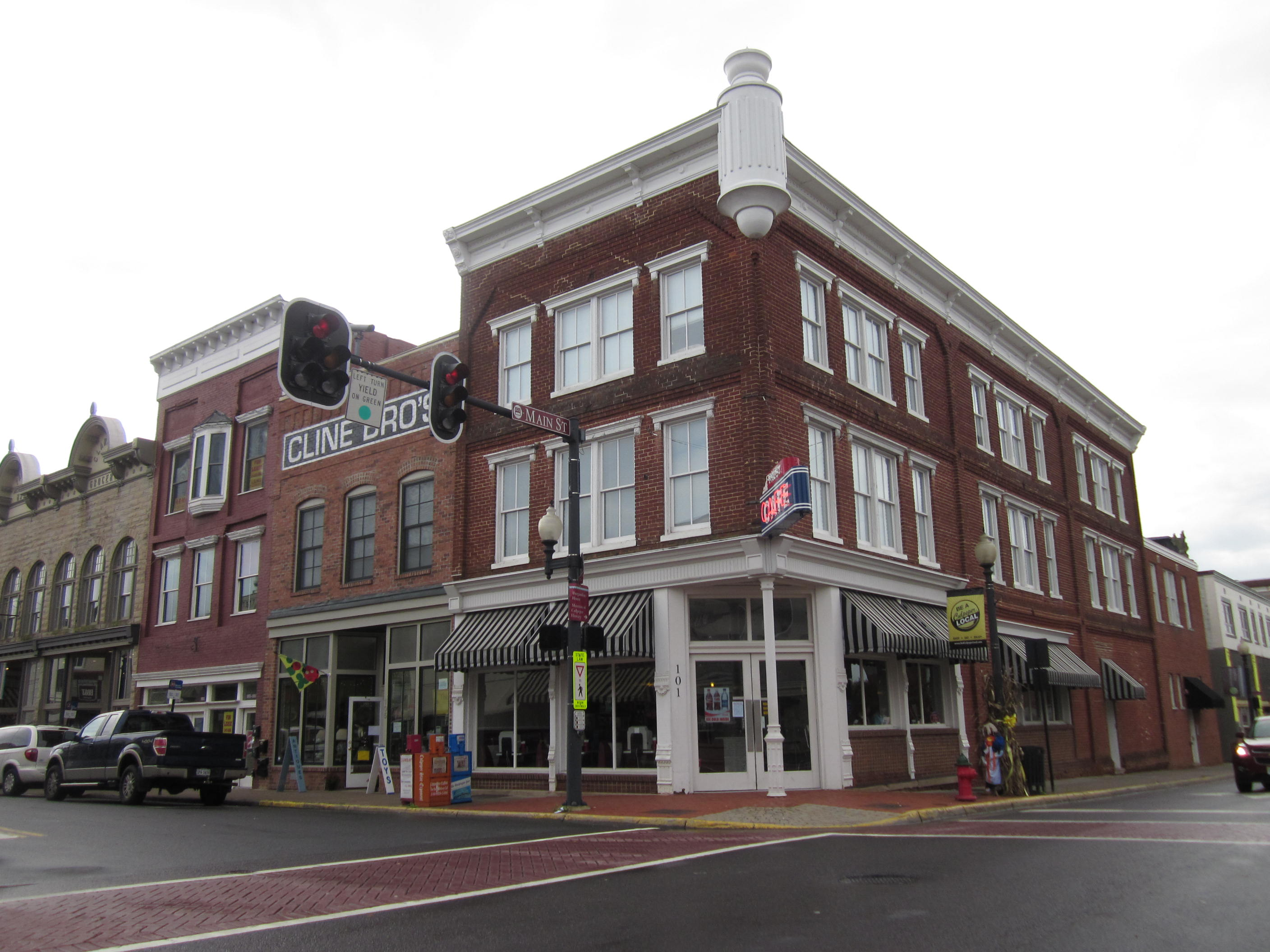 Culpeper, Virginia